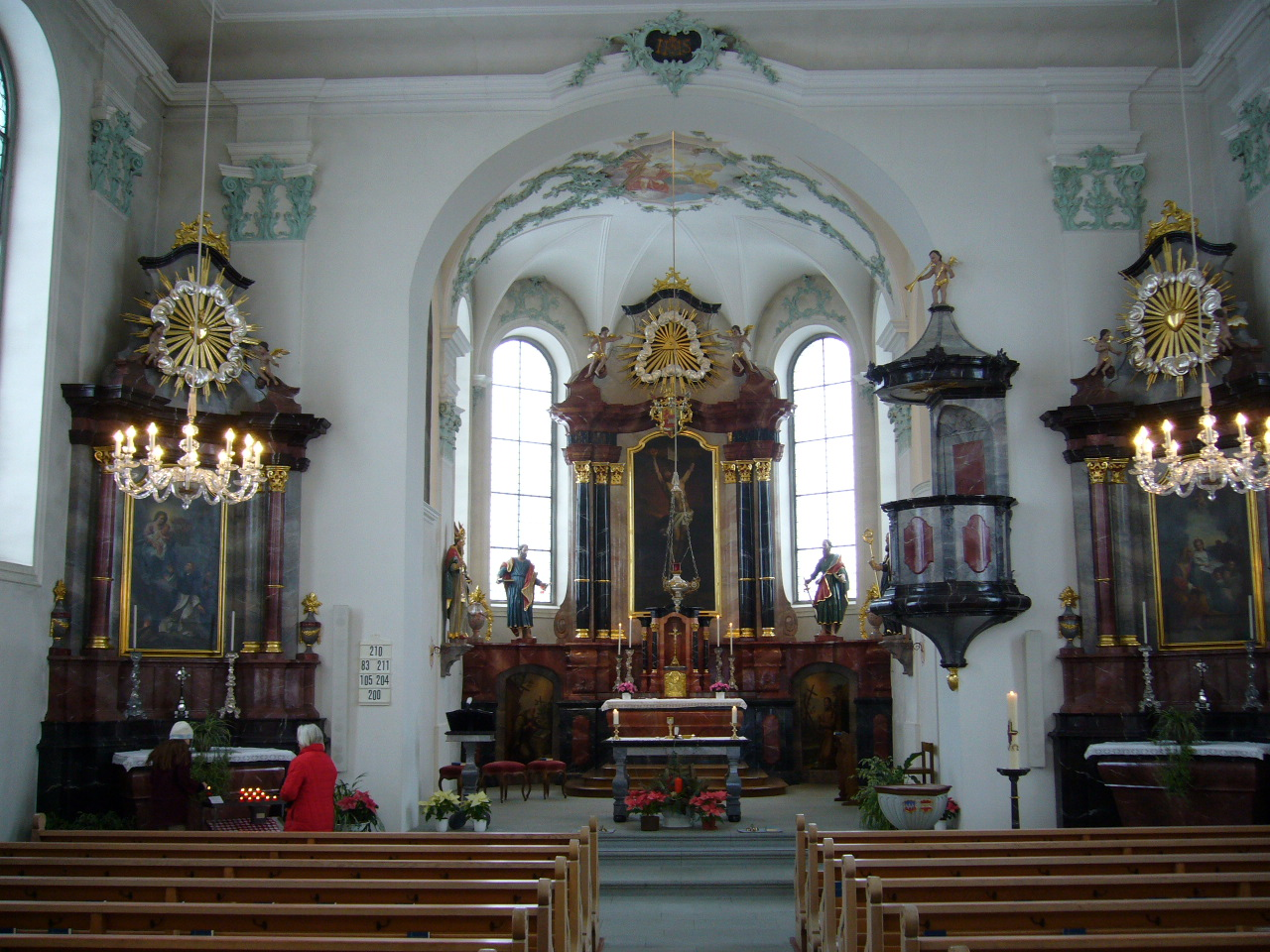 Inneres der Kirche St. Peter und Paul in Homburg, Kanton Thurgau, Schweiz